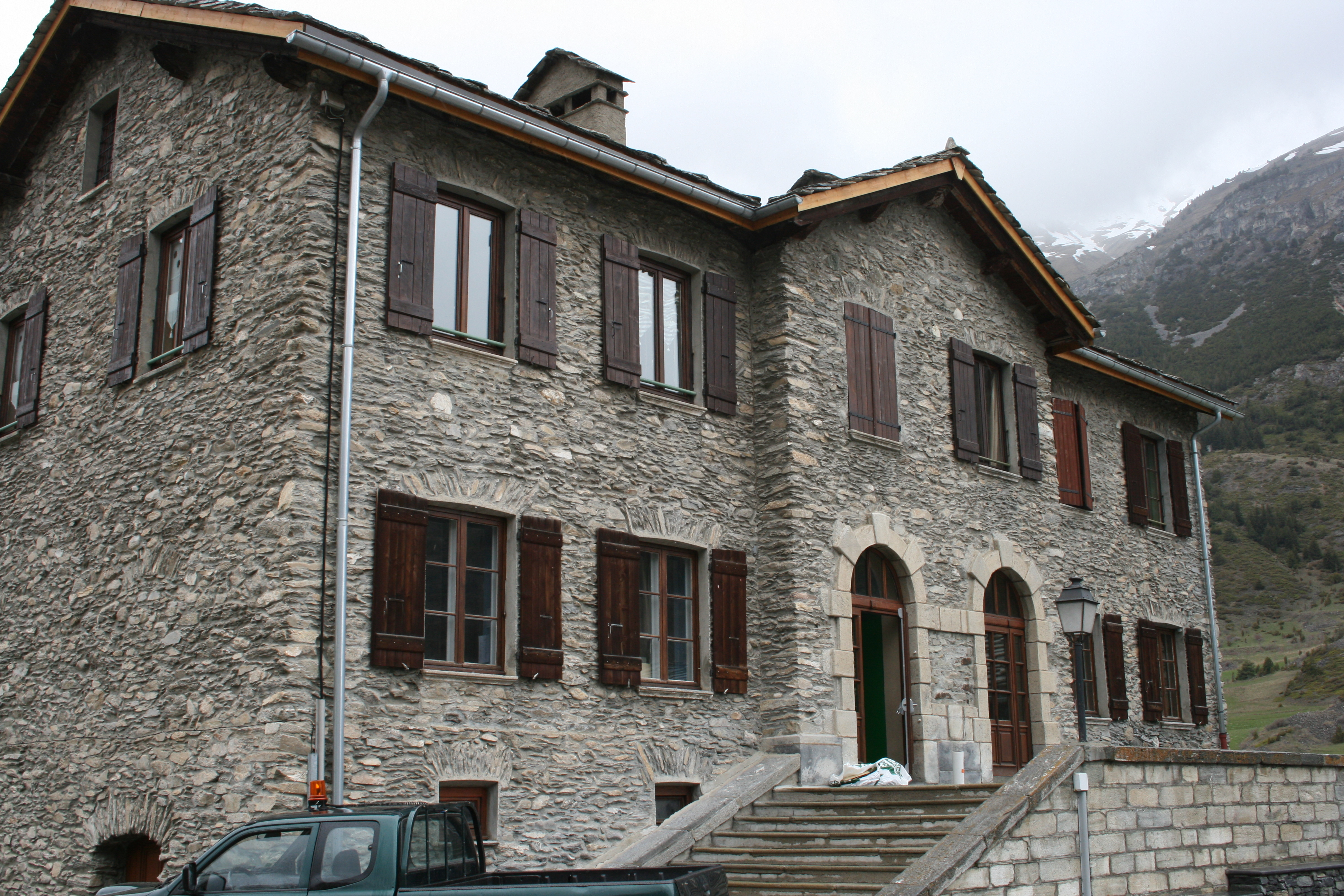 Ancienne mairie/Ecole de Lanslevillard (73)